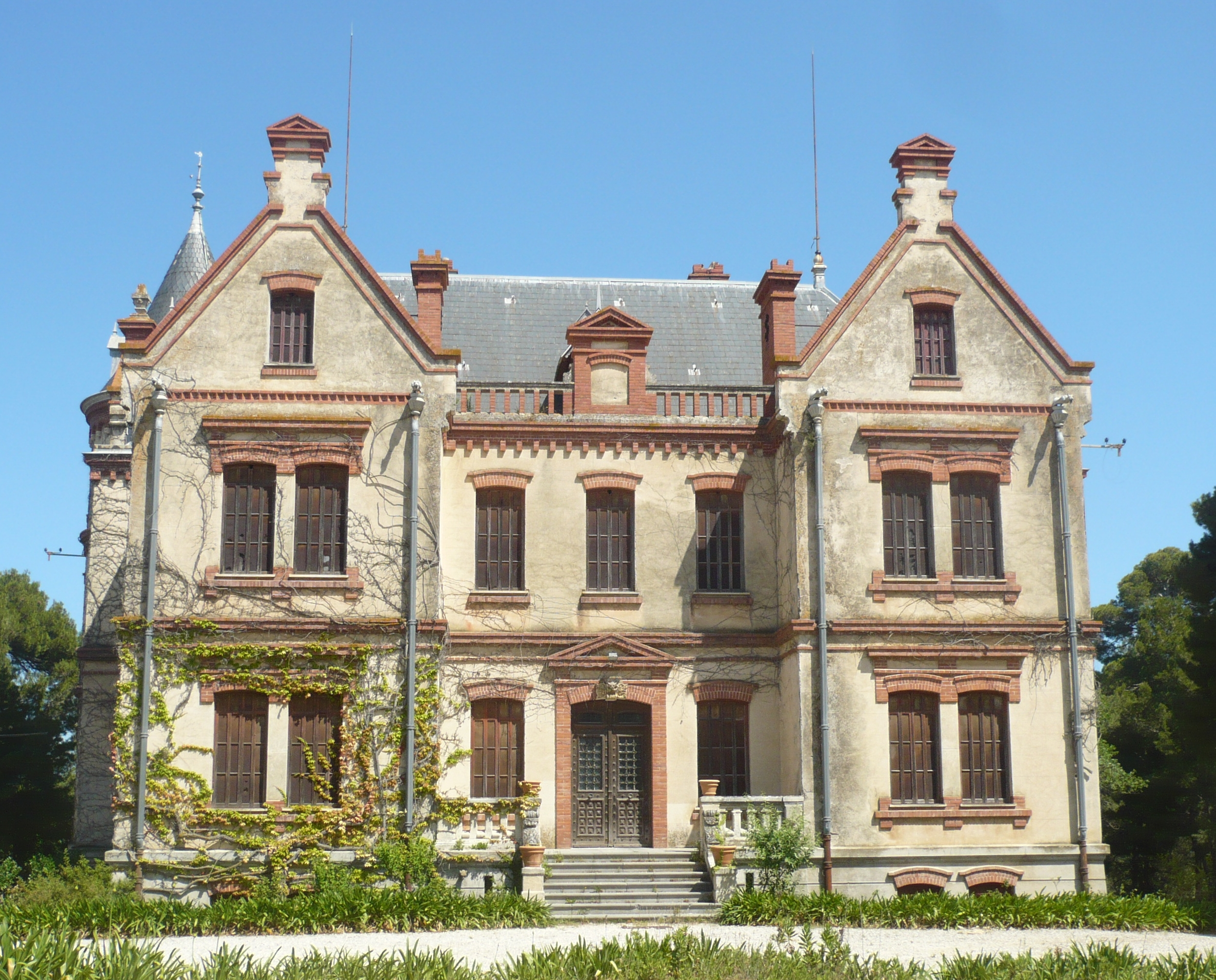 Façade ouest du château de l'Esparrou à Canet-en-roussillon